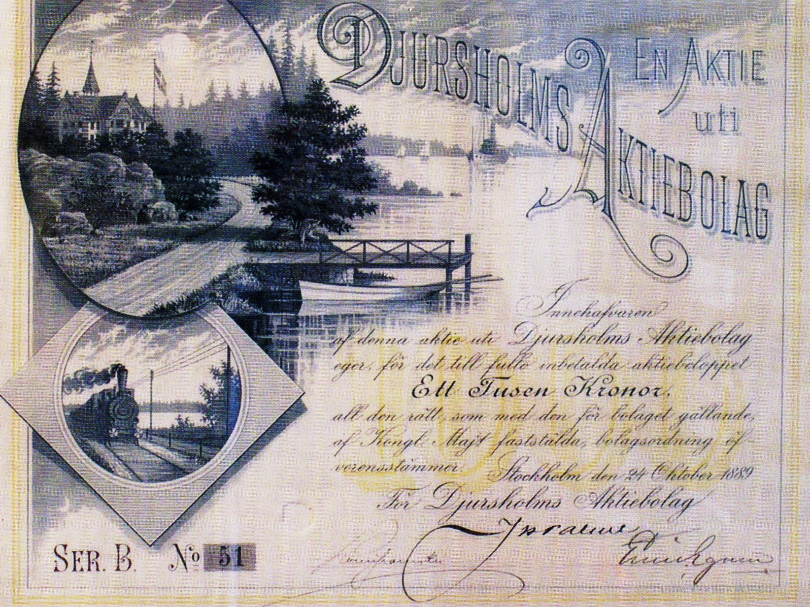 En Aktie uti Djursholms Aktiebolag